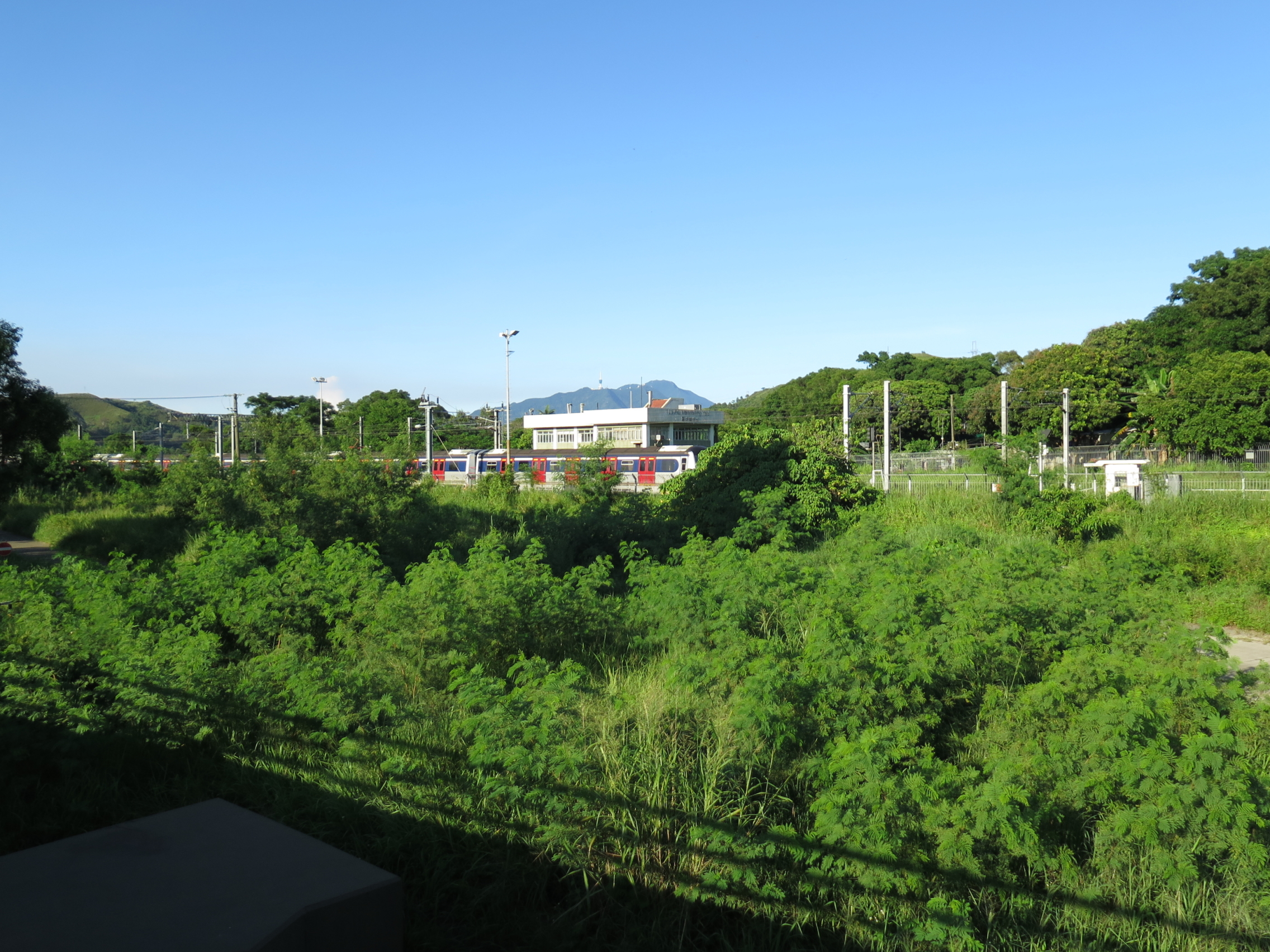 Lo Wu Marshaling Yard